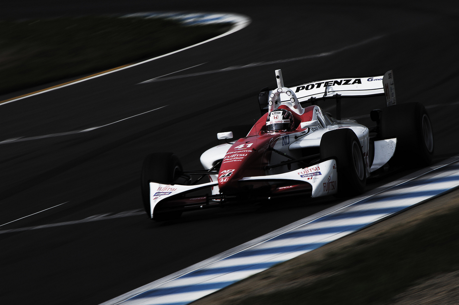 2012 Formula NIPPON Rd.2 Twin Ring Motegi #41 DOCOMO TEAM DANDELION RACING, Koudai Tsukakoshi 【#41 ドコモ・ダンデライアン 塚越 広大（2012 フォーミュラニッポン 第2戦 ツインリンクもてぎ）】